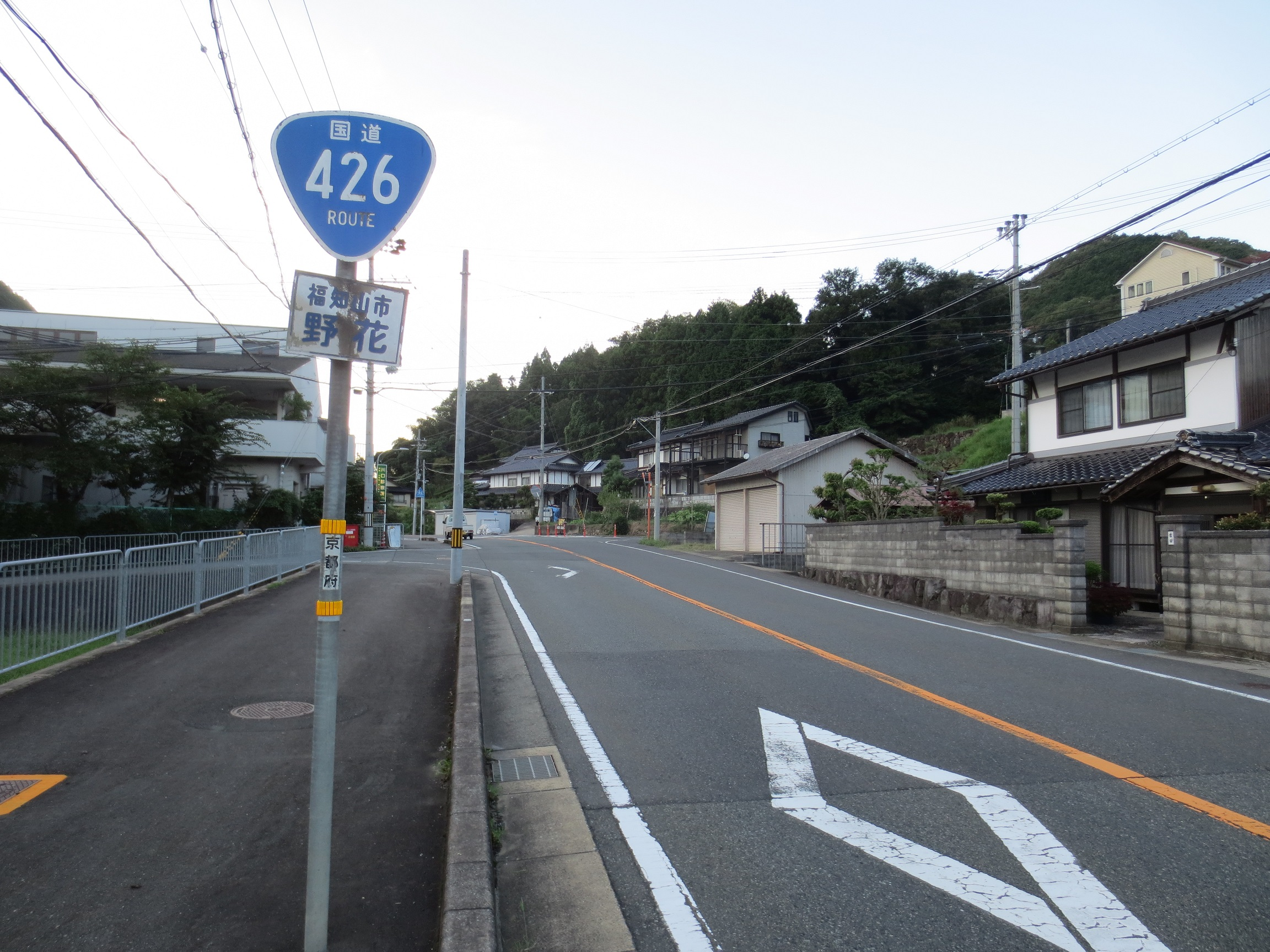 福知山市野花 国道426号の終点付近。